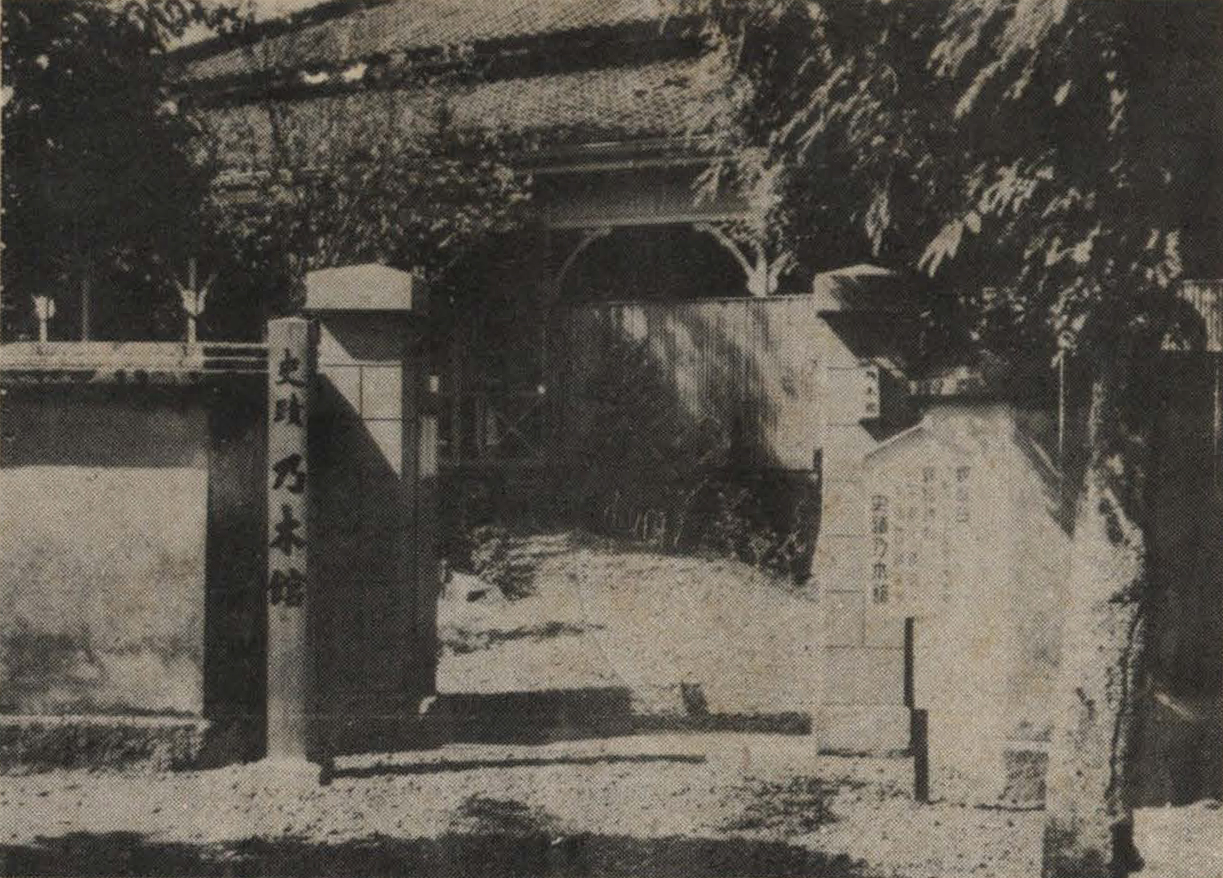 中文（台灣）: 位於臺灣台北市的乃木館，二戰後拆除